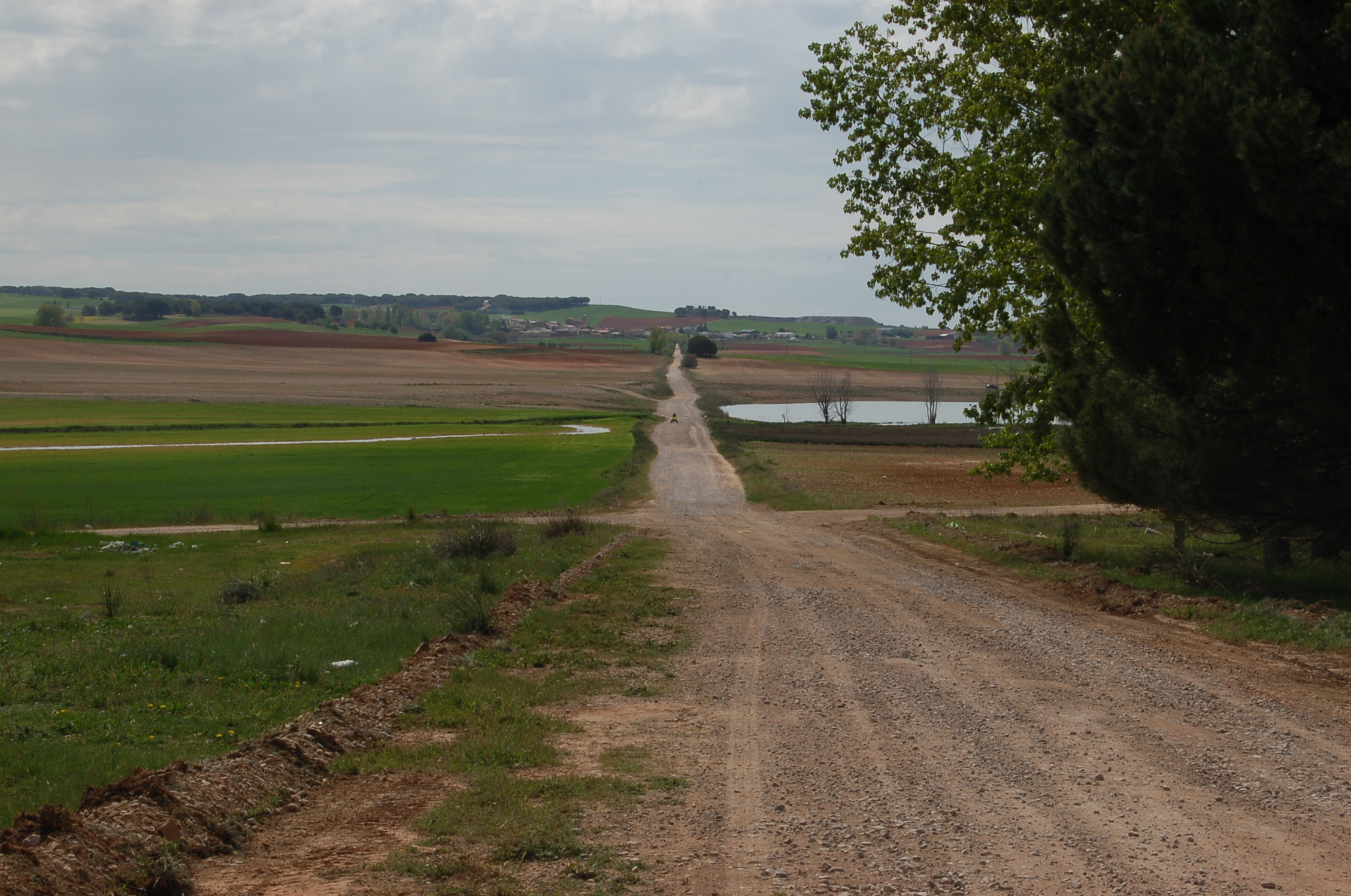 Tramo da antiga estrada N-III entre Valverde de Júcar e Hontecillas, asolagado polo encoro de Alarcón